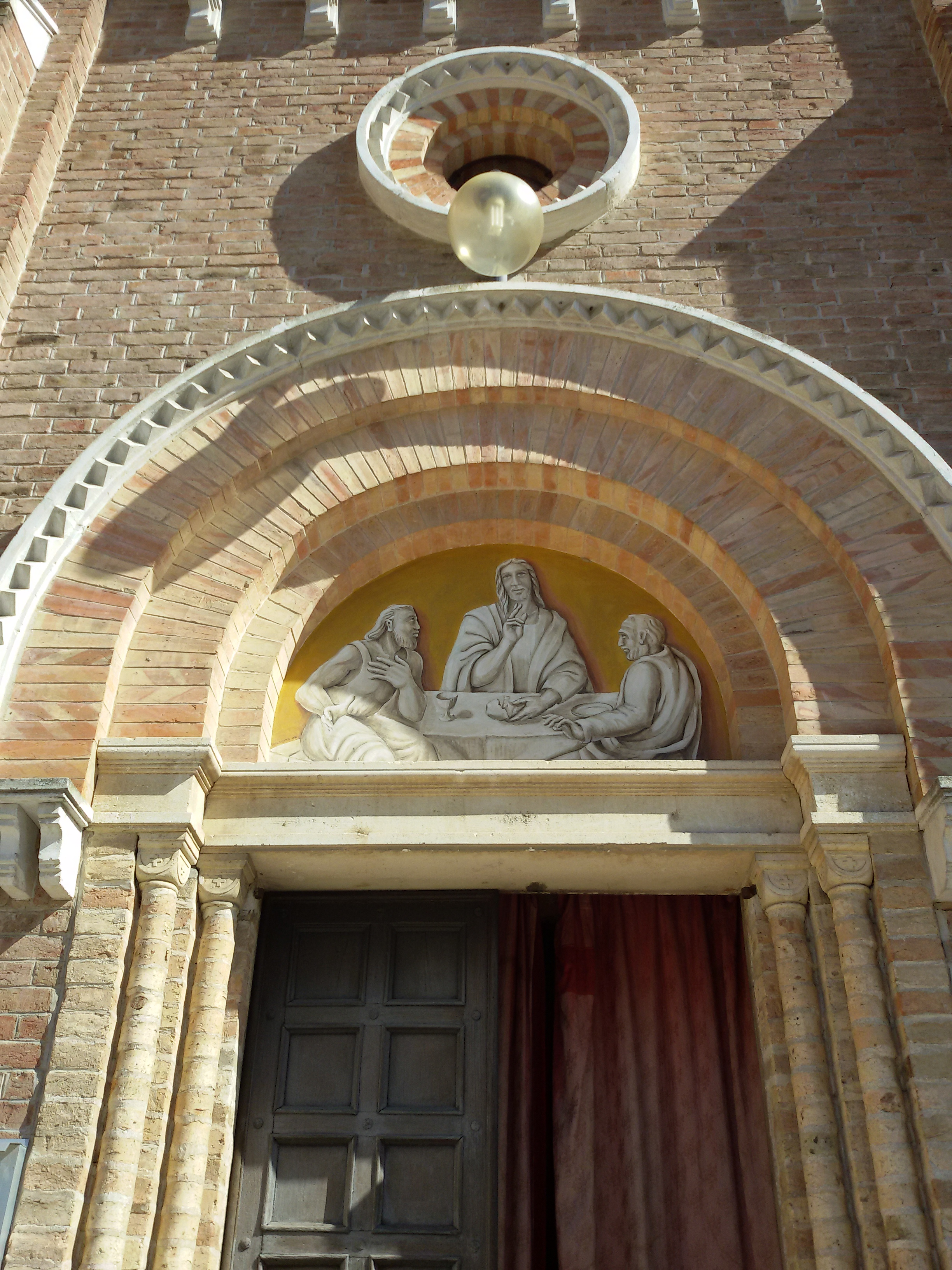 decorazioni